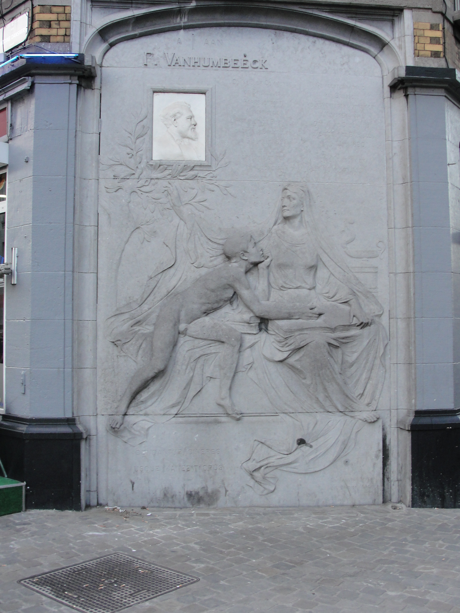 Monument voor Pierre Van Humbeeck op de hoek van de Antoine Dansaertstraat en de Papenvest te Brussel. Beeldhouwwerk door Charles Samuel.